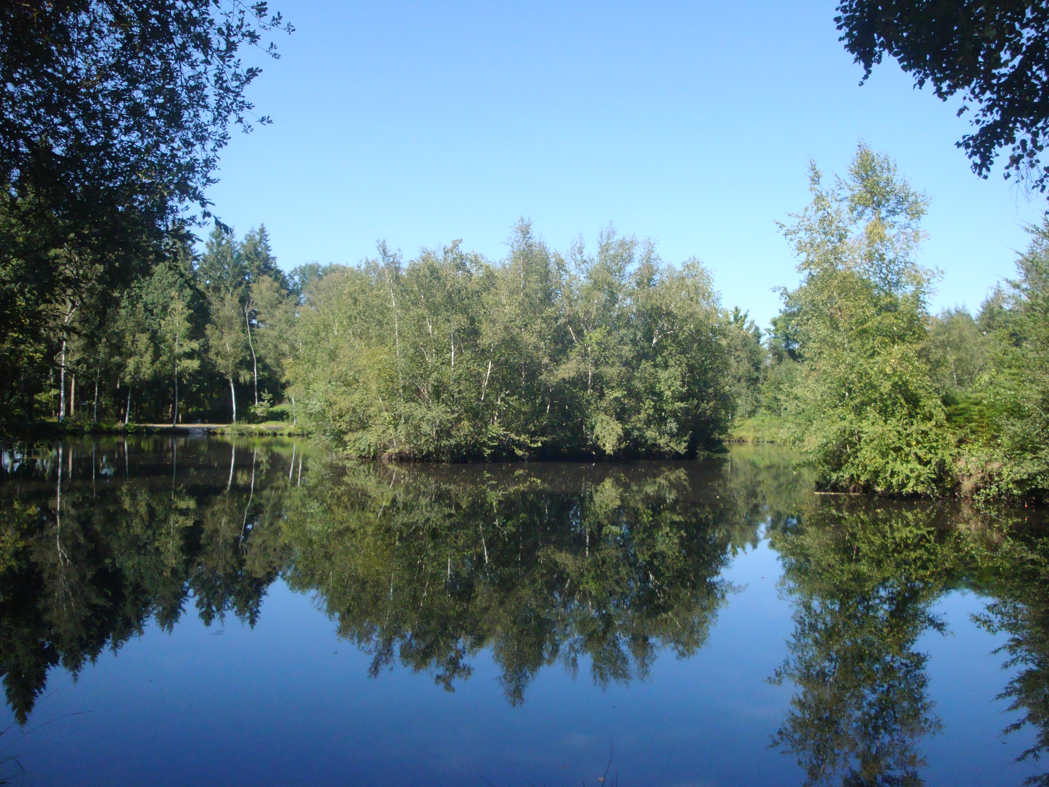 Lac dans la forêt de l'Arche de la Nature au Mans